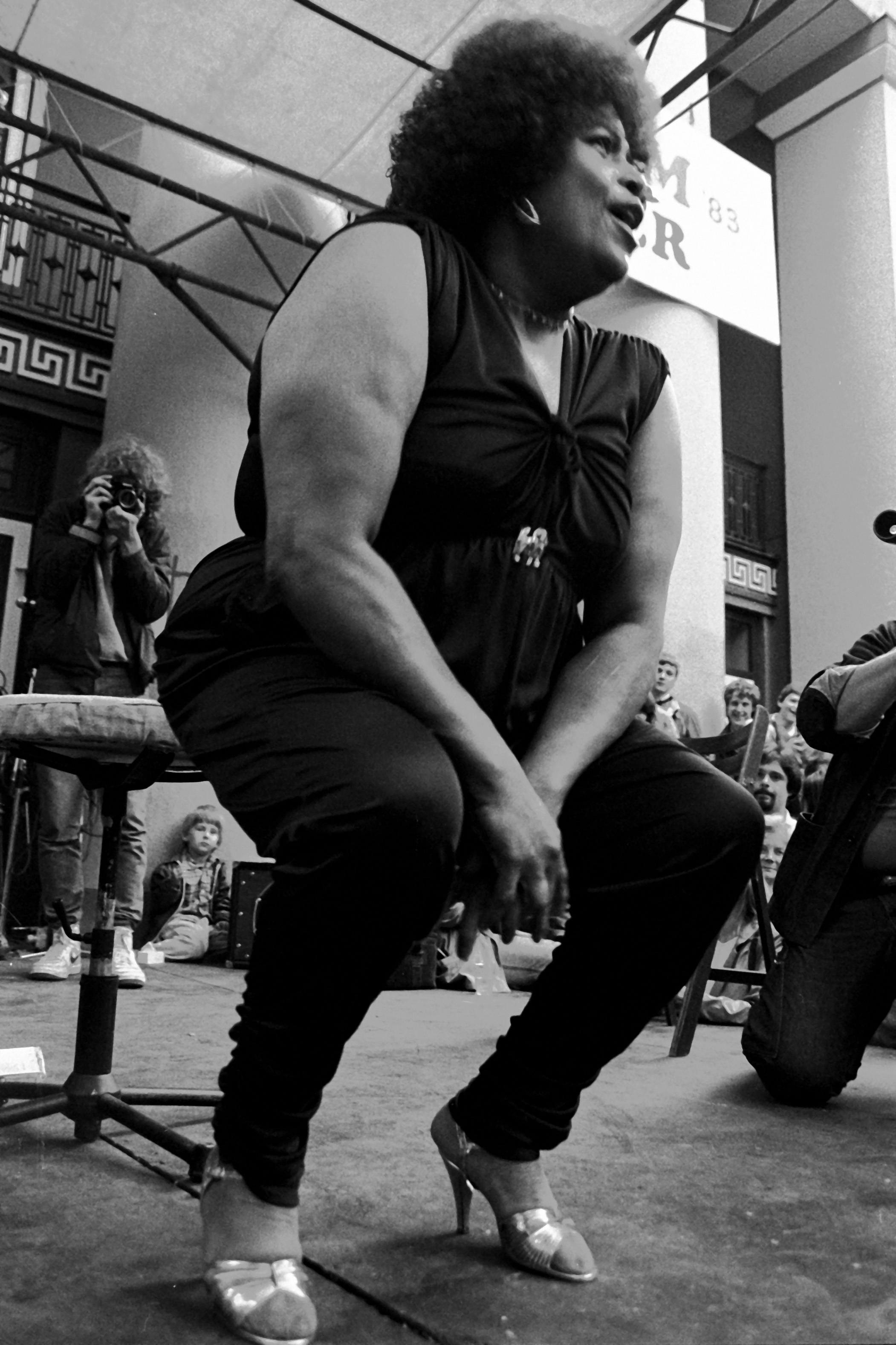 [Singer Katie Webster on Blues Festival 1983 in Hildesheim, Germany]